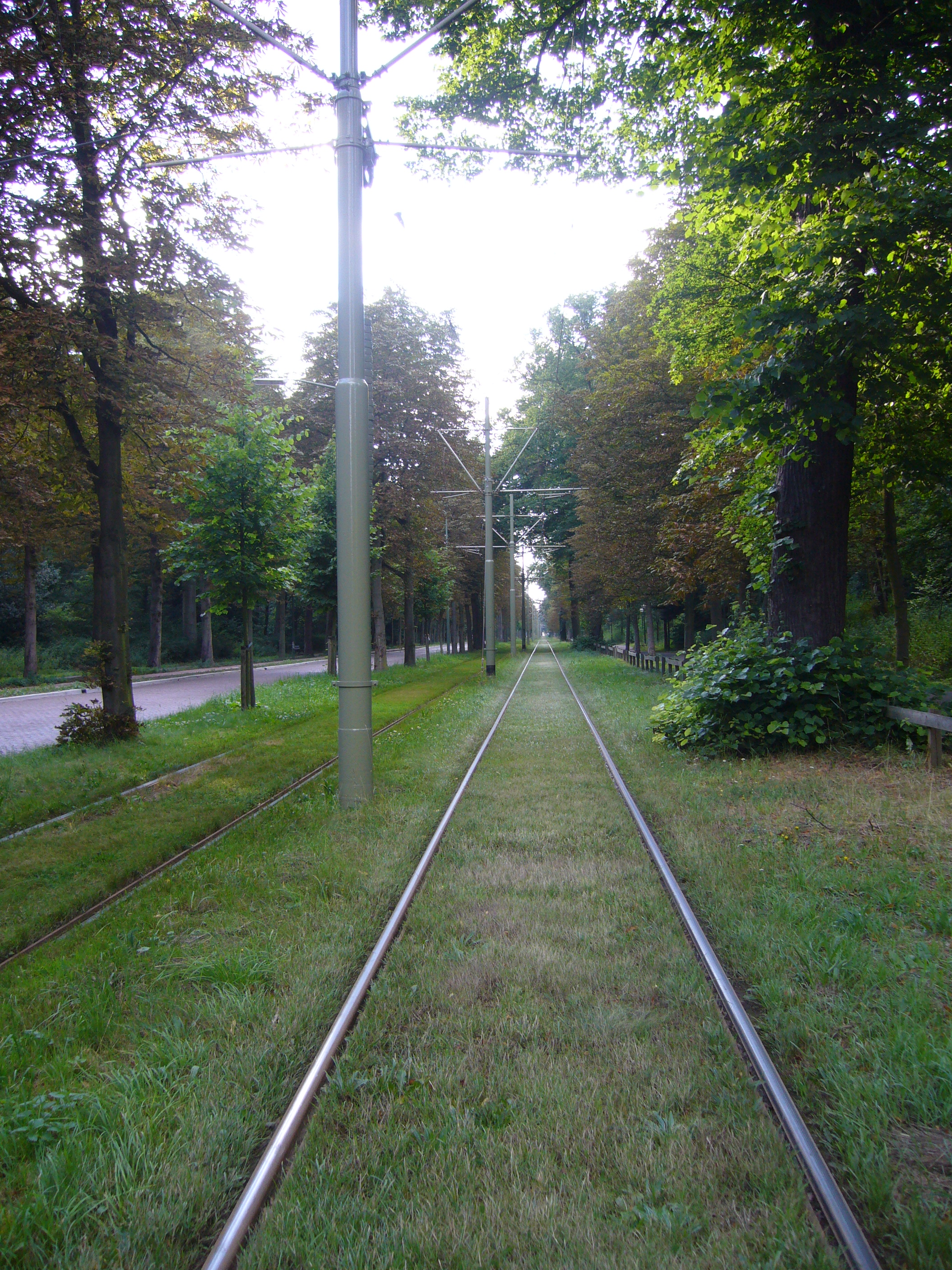 HTM: de eerste groene tramlijn. Het tramtraject van Carnegieplein tot Badhuisstraat in Scheveningen